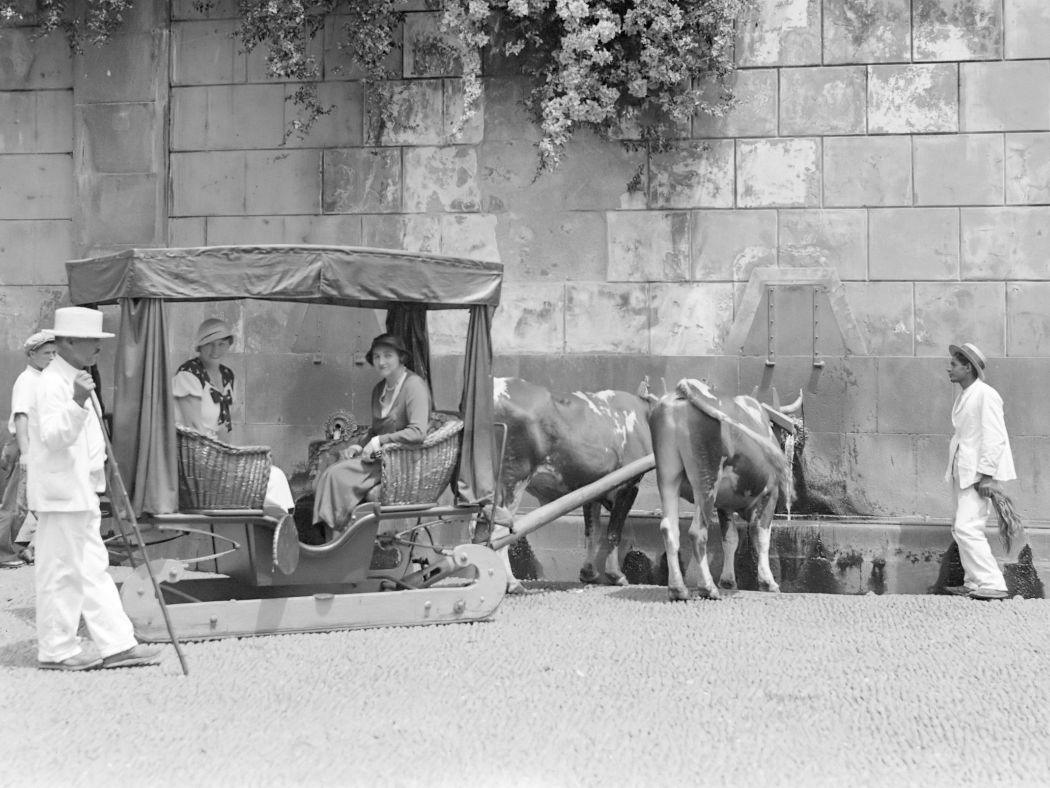 Een traditionele personenslede met Nell Langlais en Mw. Serrusp als passagier, twee ossen als trekdier en twee begeleiders. 1934